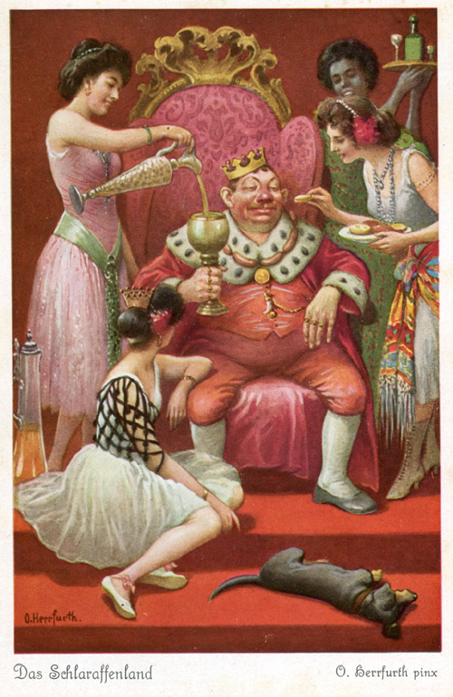 Das Märchen vom Schlaraffenland. Postkartenserie nach dem Märchen. Serie von sechs Postkarten der Firma Uvachrom. 354, Nr. 5090. Text der Rückseite: Wer im Schlaraffenland am meisten essen, trinken, spielen und schlafen kann, wer der Gefräßigste und Faulste zugleich ist, wird König. Er braucht sich nur auf seinen Thron zu setzen und sich zu füttern lassen, bis er einschläft. Wer will König von Schlaraffenland werden?